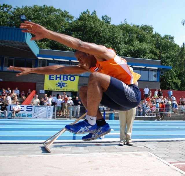 David van Hetten during Keien Meeting 2007